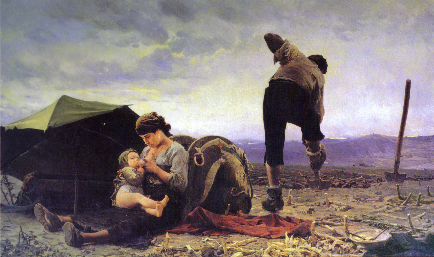 Immagine del quadro. 213x372 cm, Roma, Ministero dell'Agricoltura e delle Foreste.